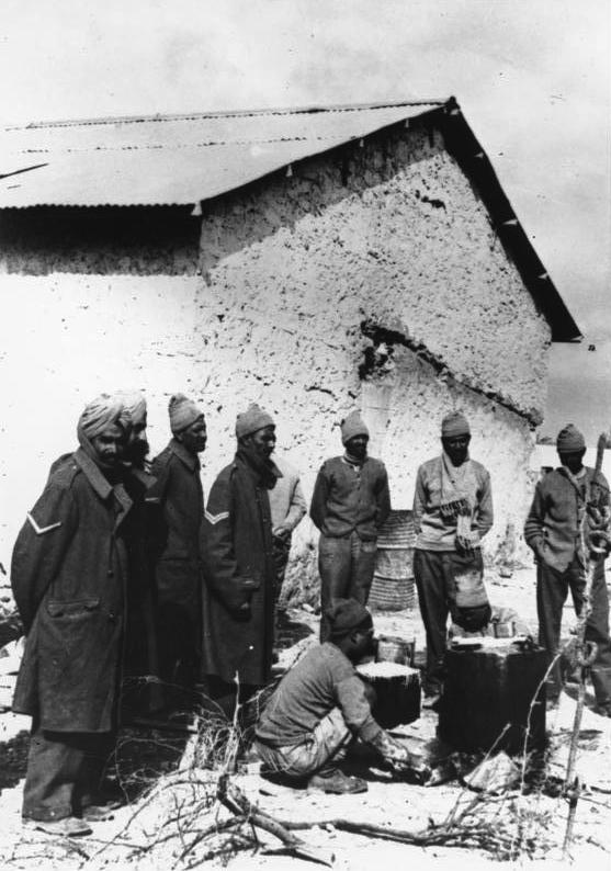 Englands Hilfsvölker Bei Derna gefangene Inder mit ihren typischen Turbanen. PK-Grimm